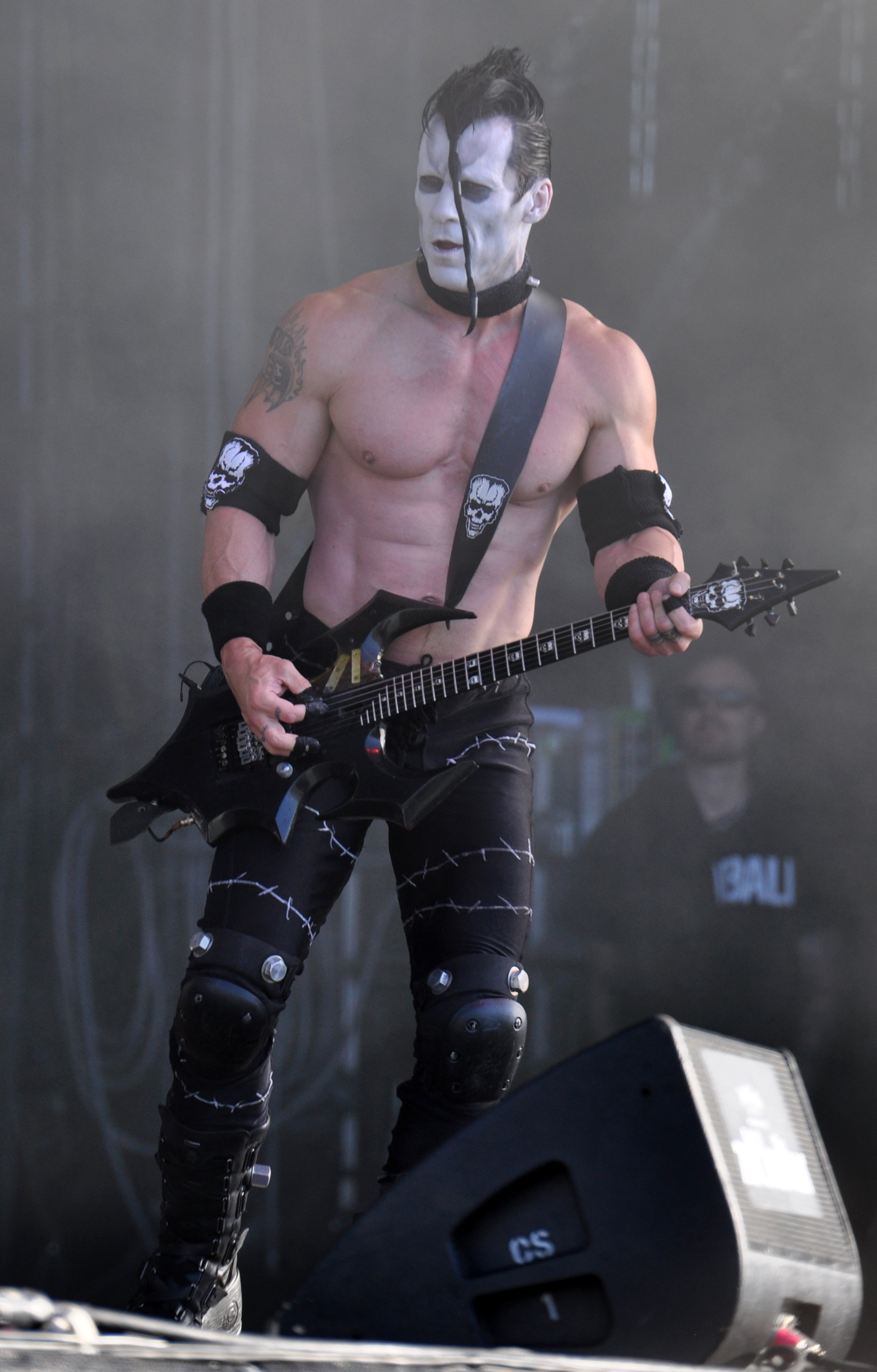 Danzig at Wacken Open Air 2013